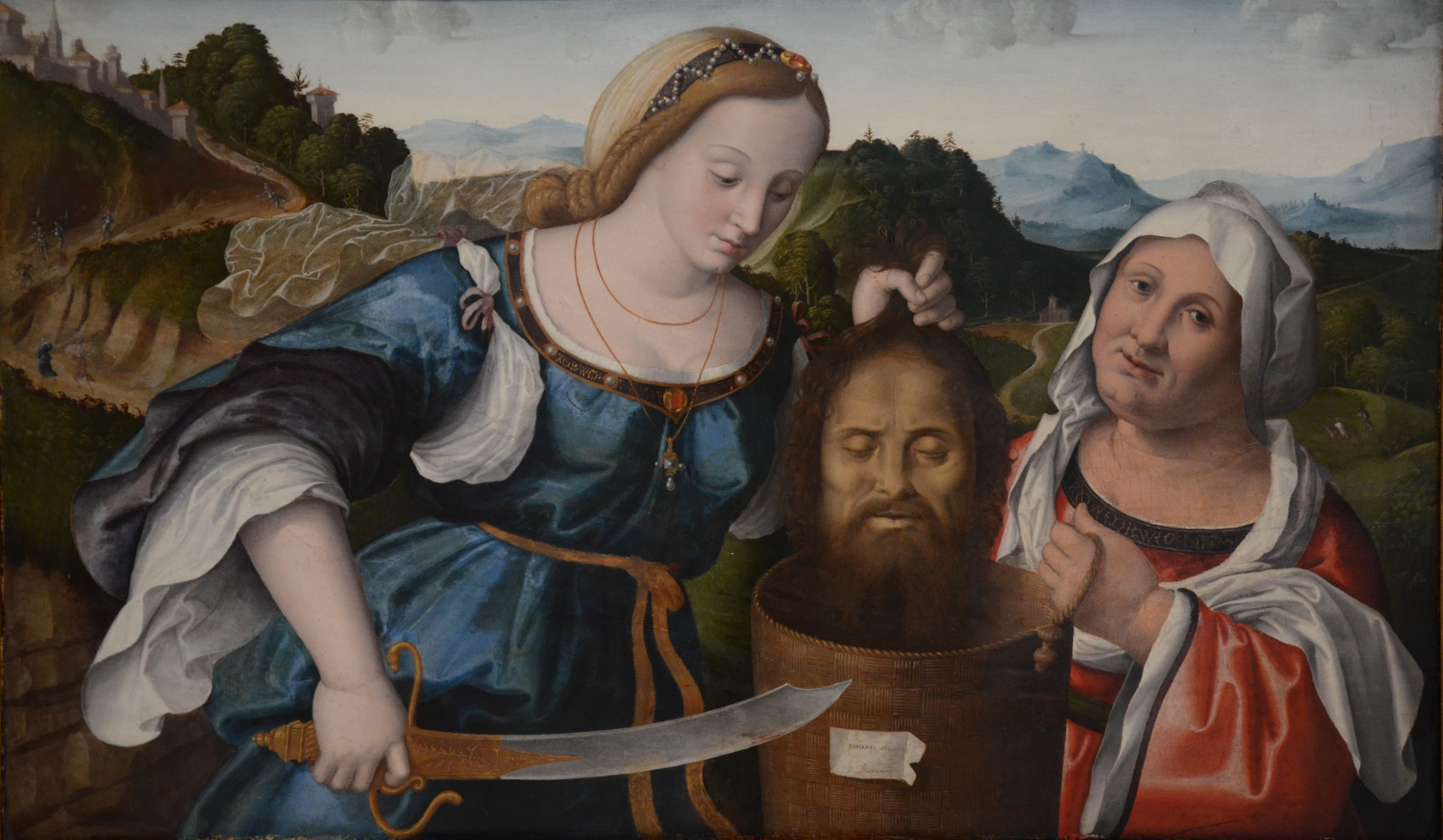 detail ?